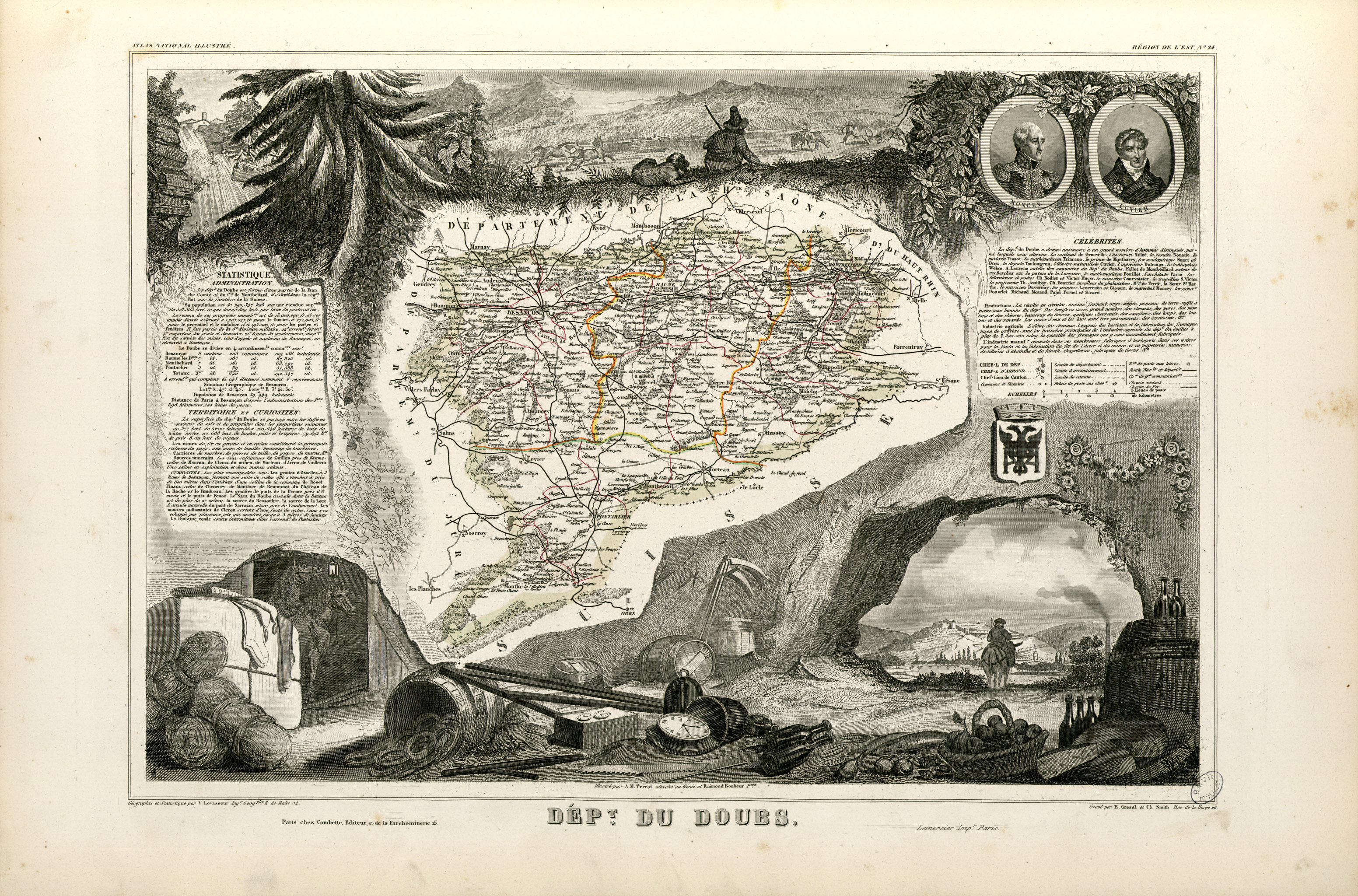 Titre complet du recueil : Atlas national illustré des 86 Départements et des Possessions de la France divisé par Arrondissements, Cantons et Communes avec le tracé de toutes les routes, chemins de fer et canaux. Dressé d'après les Travaux du Cadastre du Dépôt de la Guerre et des Ponts et Chaussées par V. Levasseur, Ingénieur Géographe attaché au Génie du Cadastre et de la Ville de Paris. Gravé sur acier par les meilleurs artistes. Imprimerie de Lemercier à Paris ou imprimerie Dupuich à Paris. Page de titre et 100 pl. en n. et b. et en coul. dont un tableau statistique et 2 cartes dépliantes. Ancely, René (1876 - 1966). Possesseur